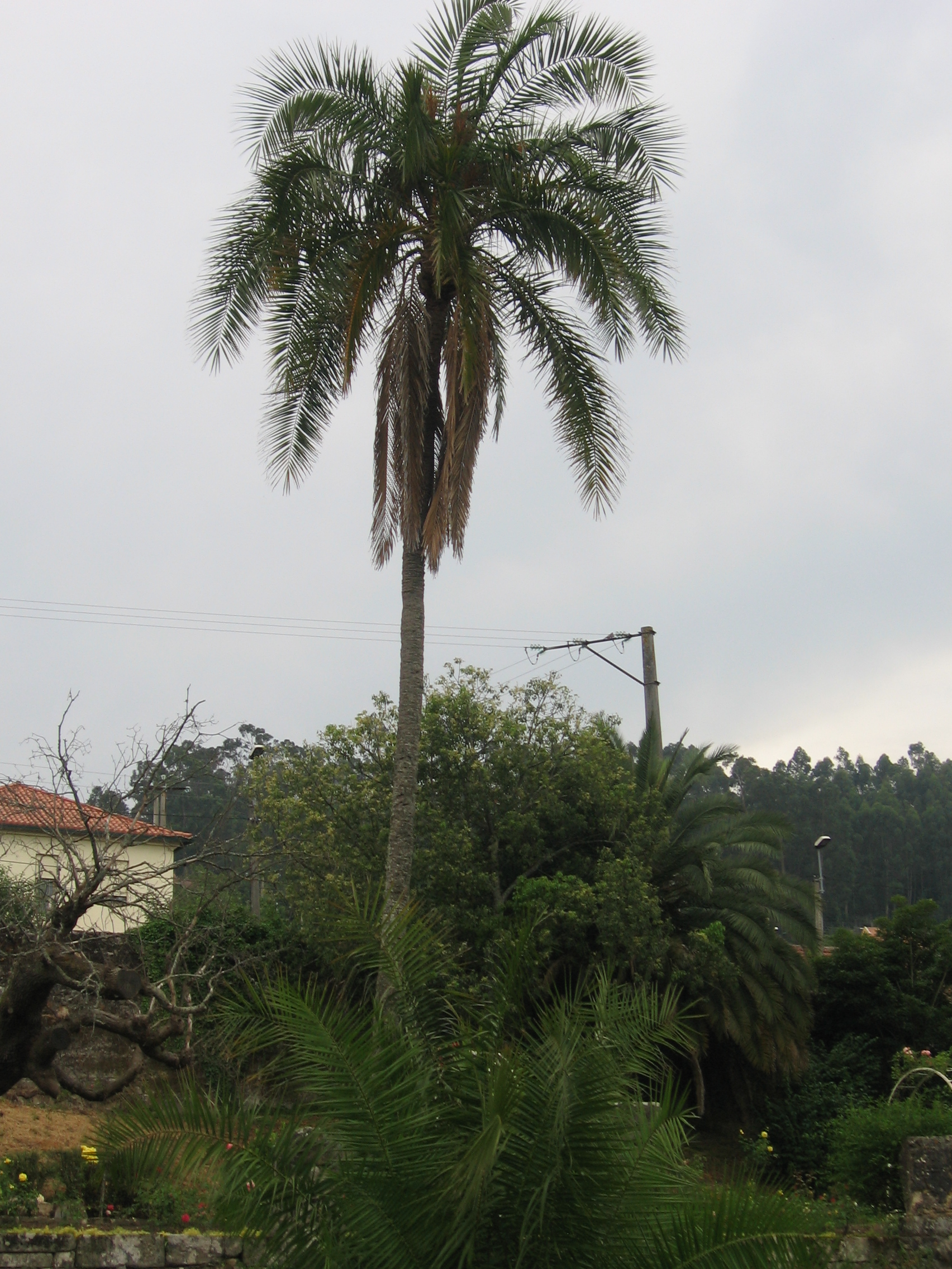 Palmeira do Senegal, Castrelos, Vigo